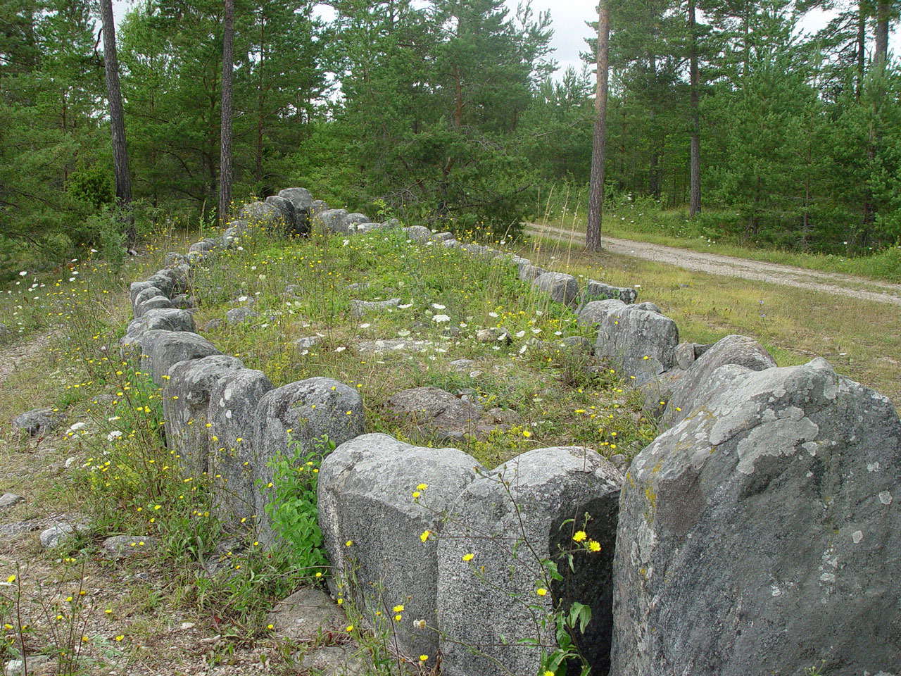 Gotland, Schiffsetzung Tjelvars Grab (Ort:Gemeinde Boge)